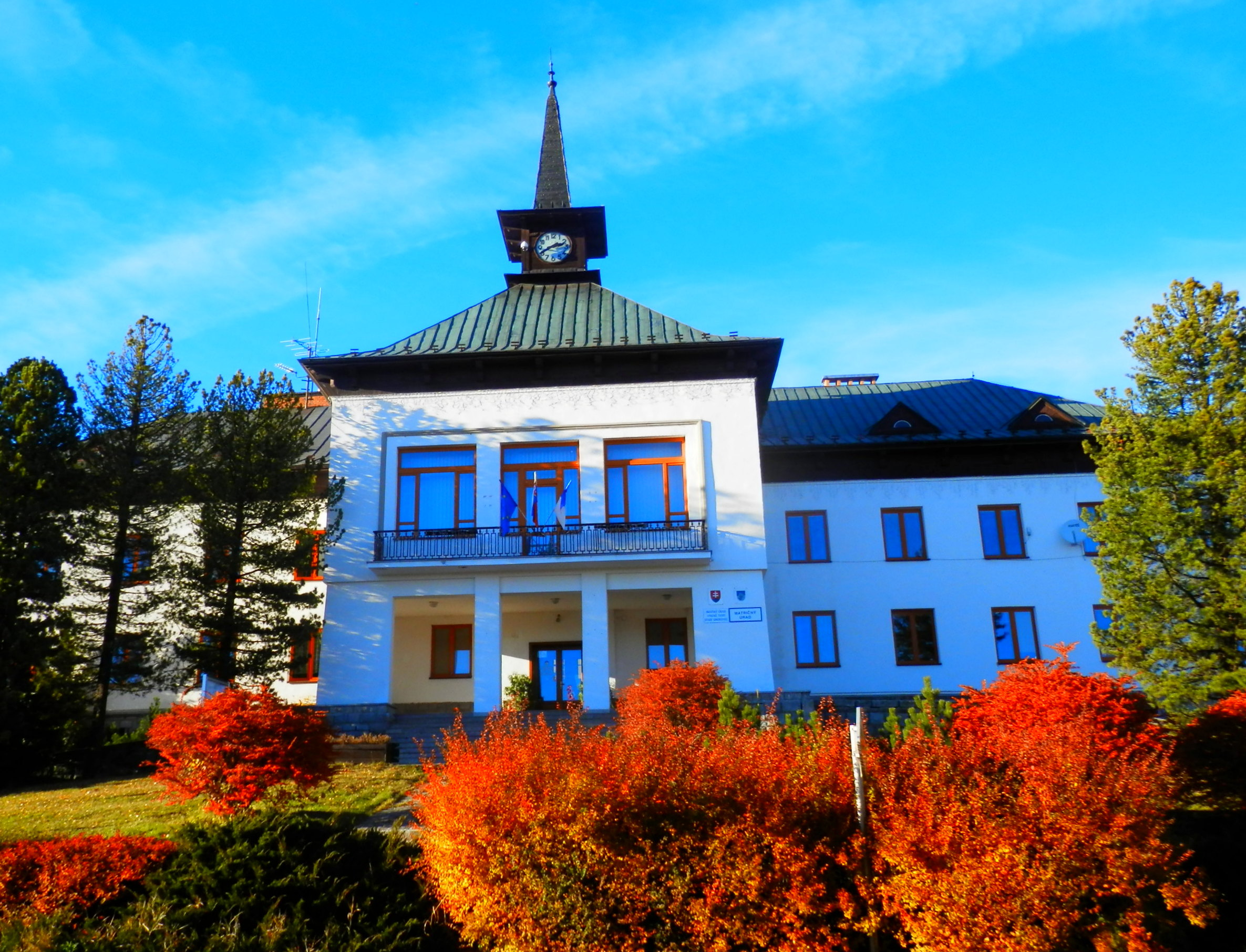 Starý Smokovec, budova radnice, mesto Vysoké Tatry.